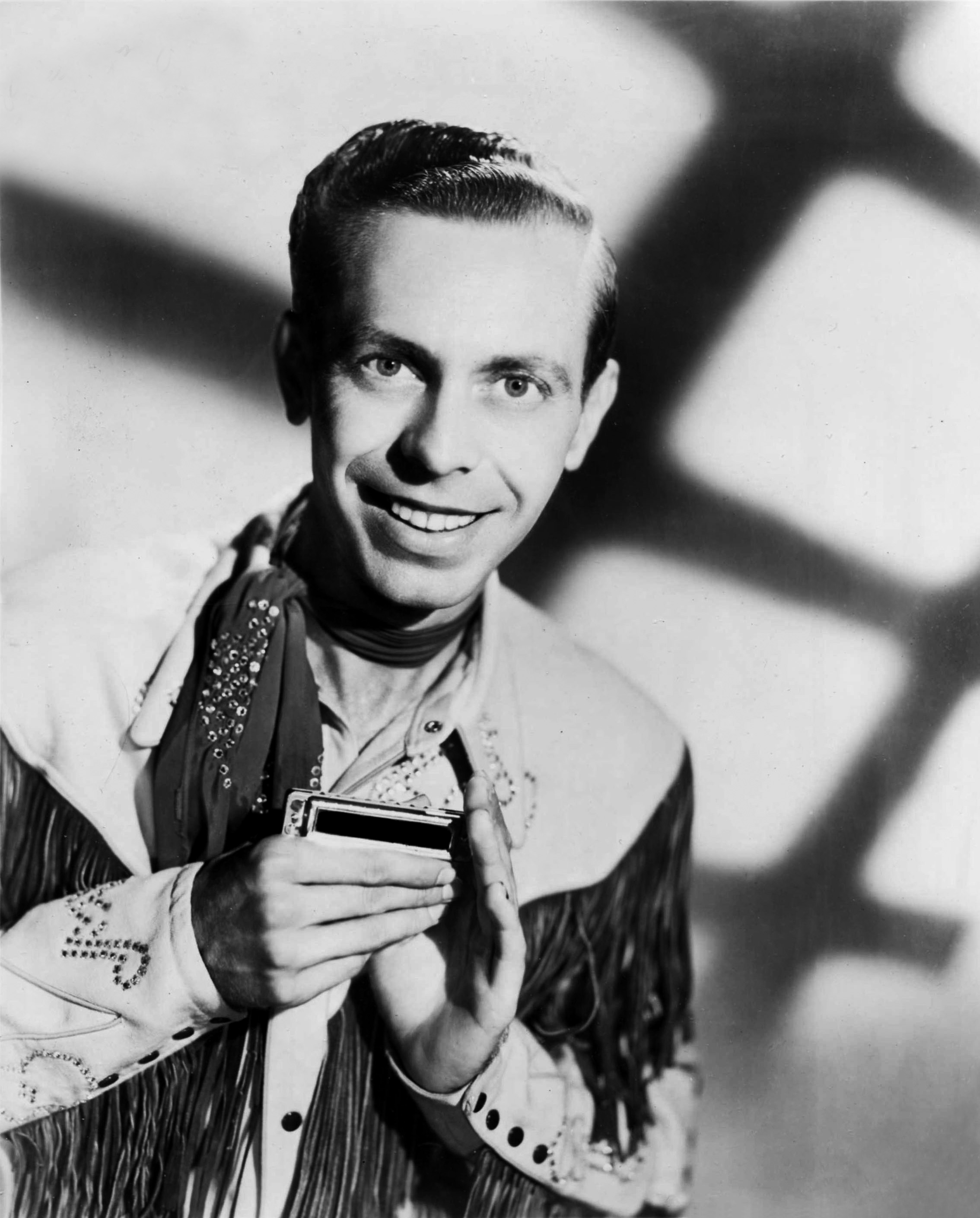 Wayne Raney, Schaeffer Studio, Hollywood, California, 1950